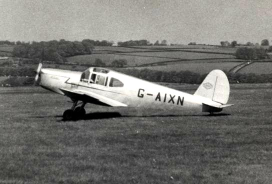 Mraz M1C Sokol G-AIXN Yeadon 1954